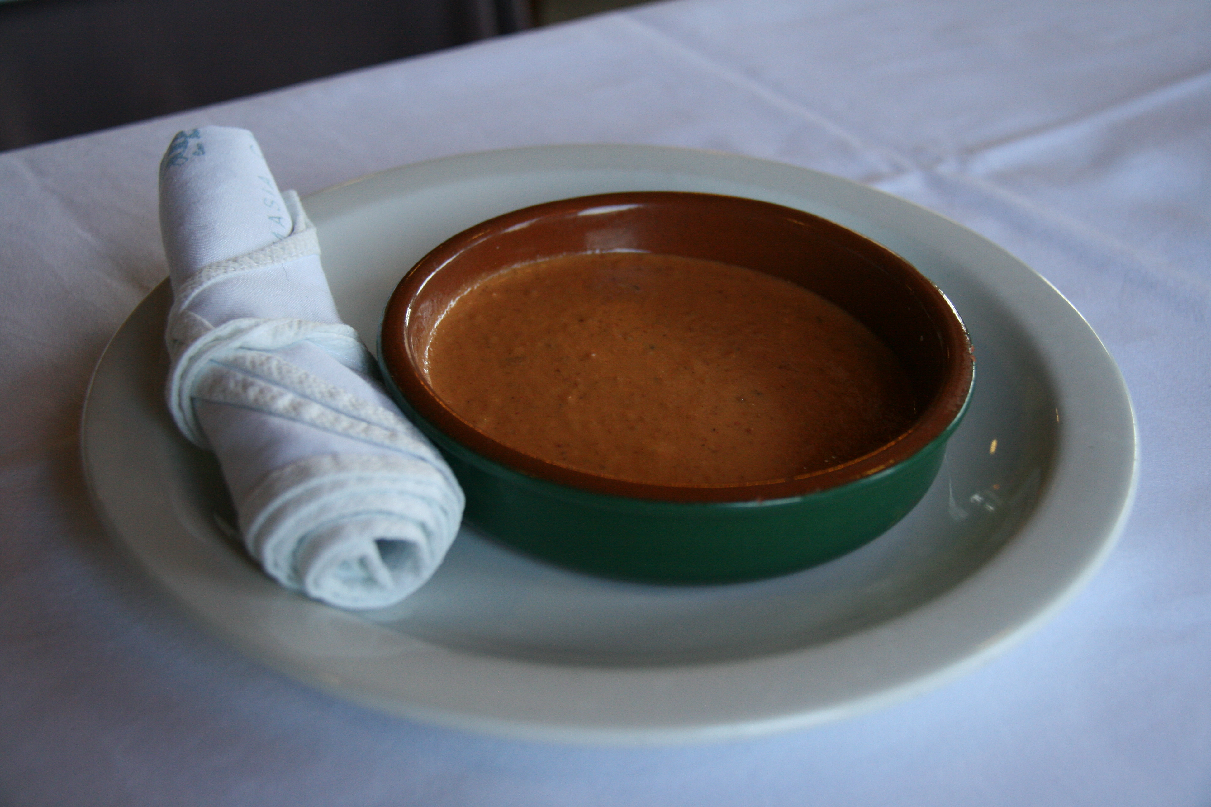 Salsa romescu con el Babero enrrollado para tomar los Calçots